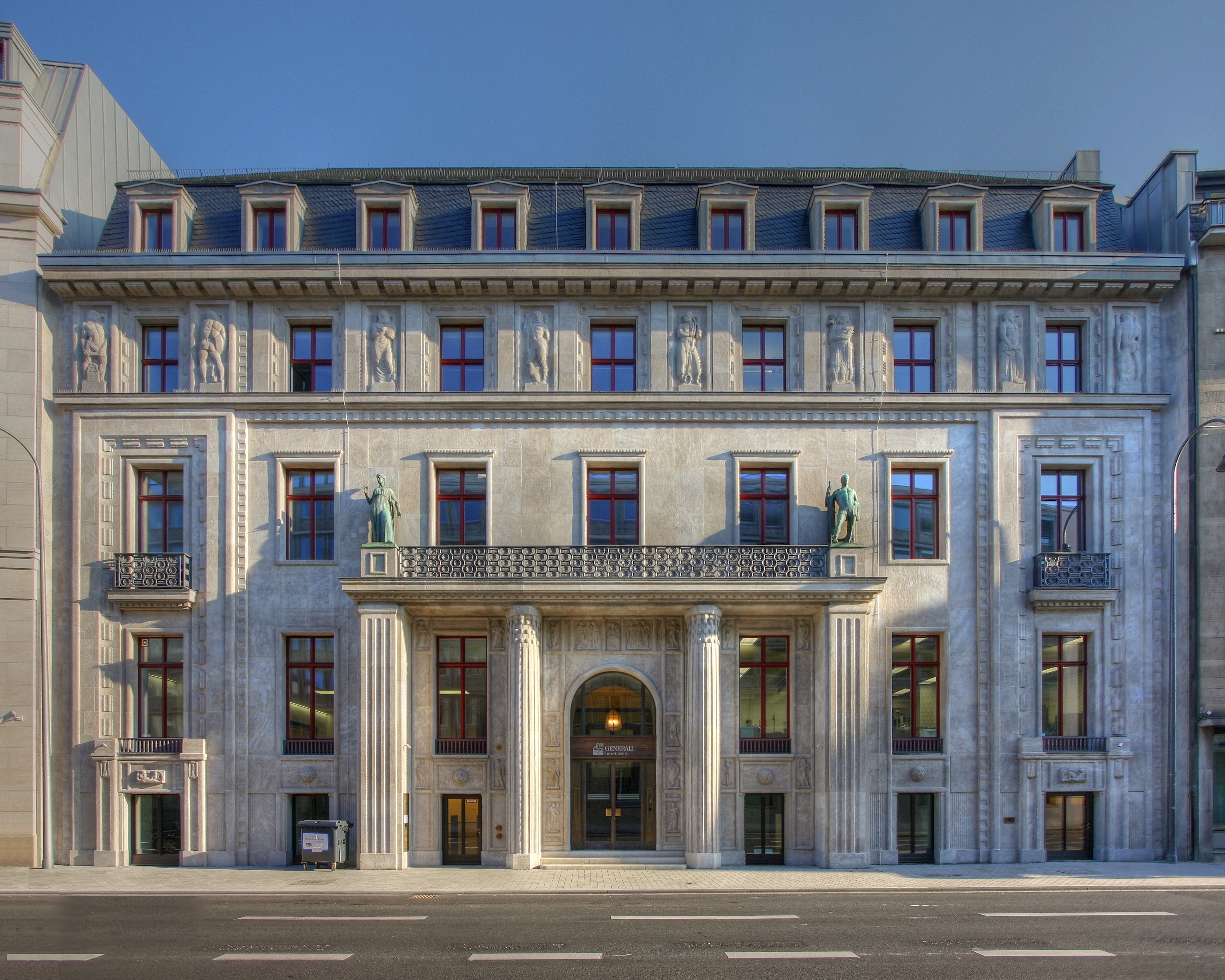 Gebäude der Generali Deutschland, Unter Sachsenhausen 21-27, Köln; Teil des Dominium-Komplexes; vormals „Commerzbank-Palais“, erbaut 1913 für den Barmer Bankverein durch Architekt Carl Moritz